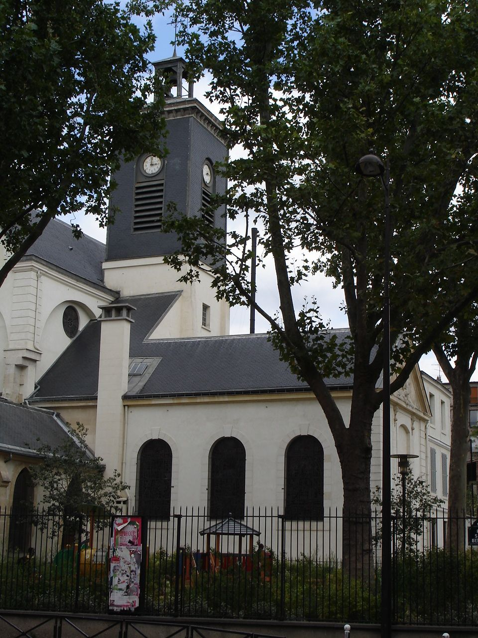 Église Sainte-Marguerite, rue Saint-Bernard (Paris XIe arrondissement).